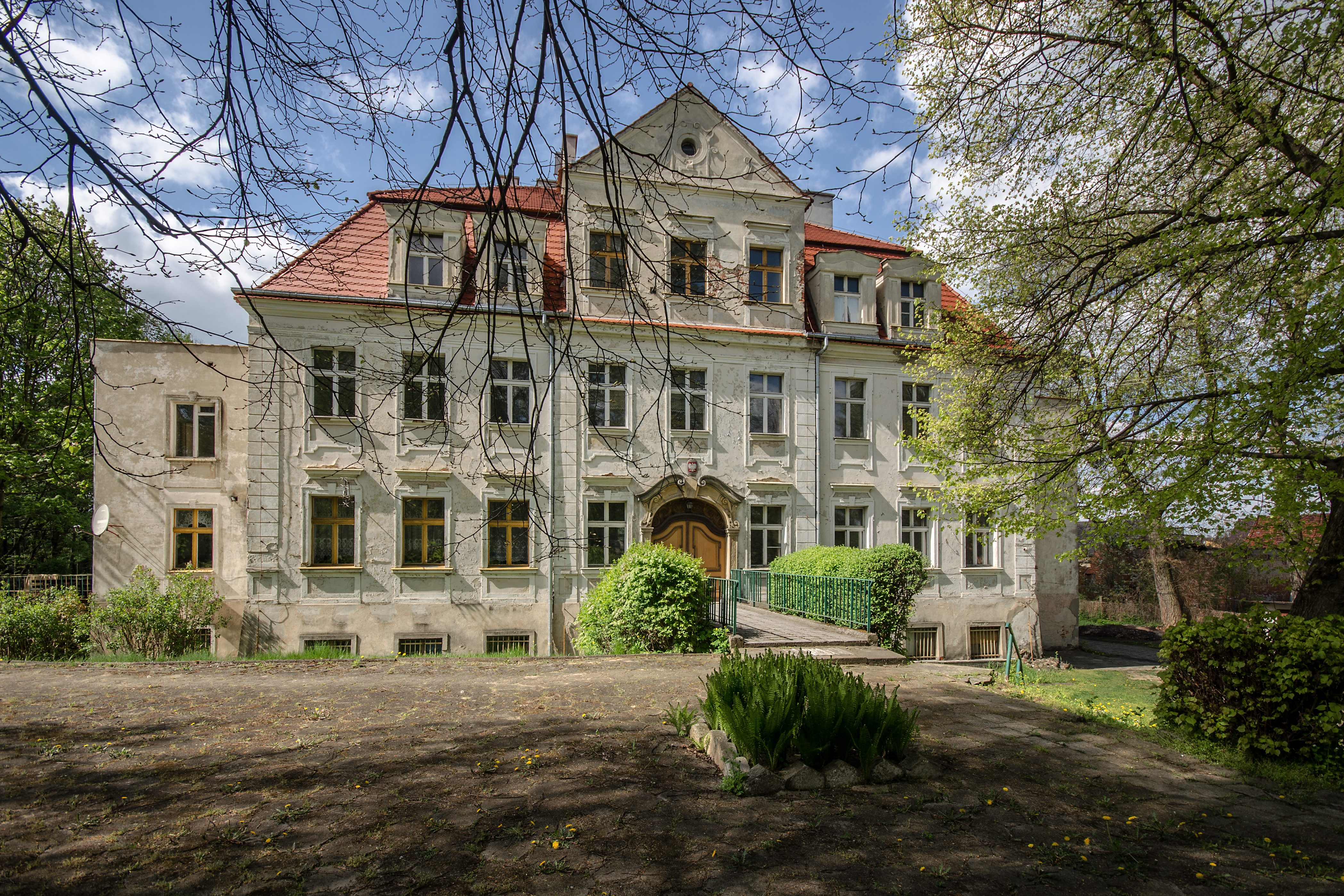 Twardogóra, pałac, 1594, 1715, l.60.-70. XX